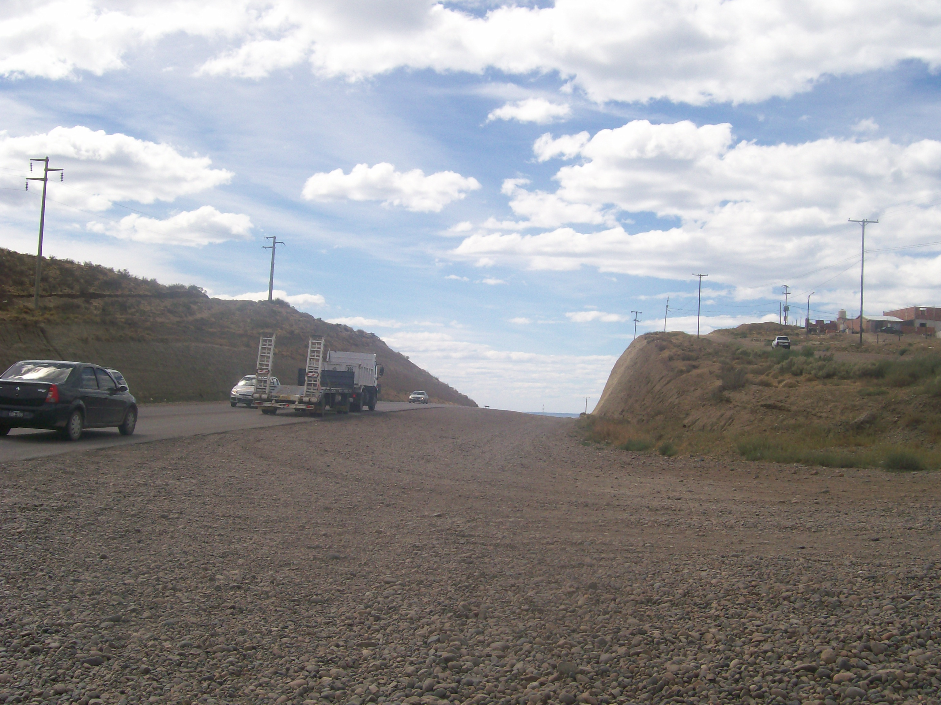 Vista a la Ruta 12 desde Km. 3